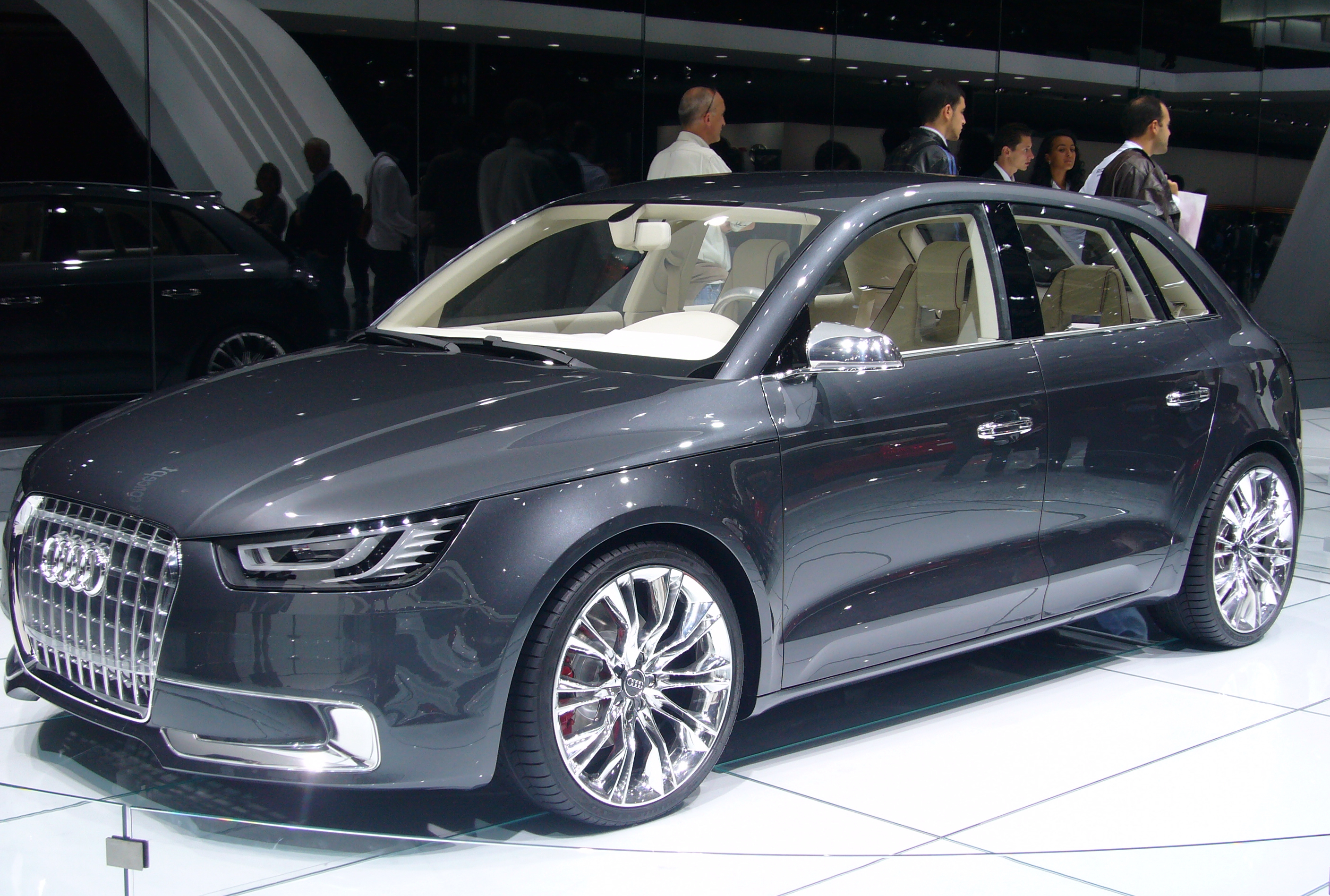 Mondial de l'Automobile Paris 2008